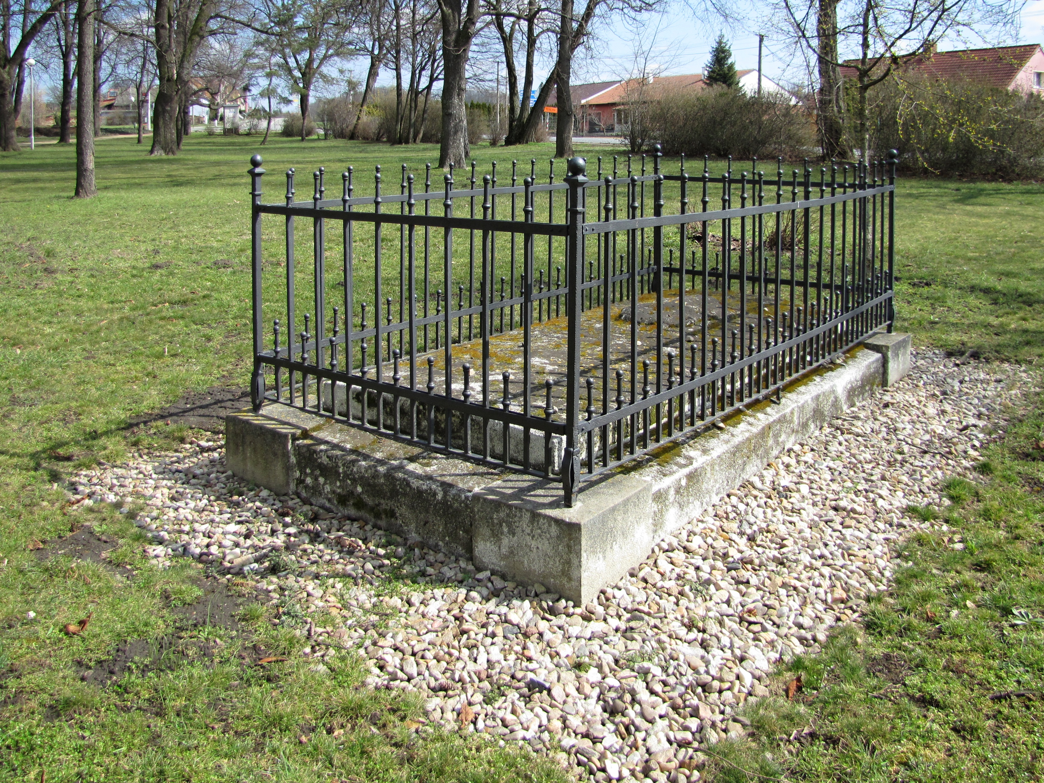 Náhrobek Friedricha Clausewitze v Čejči